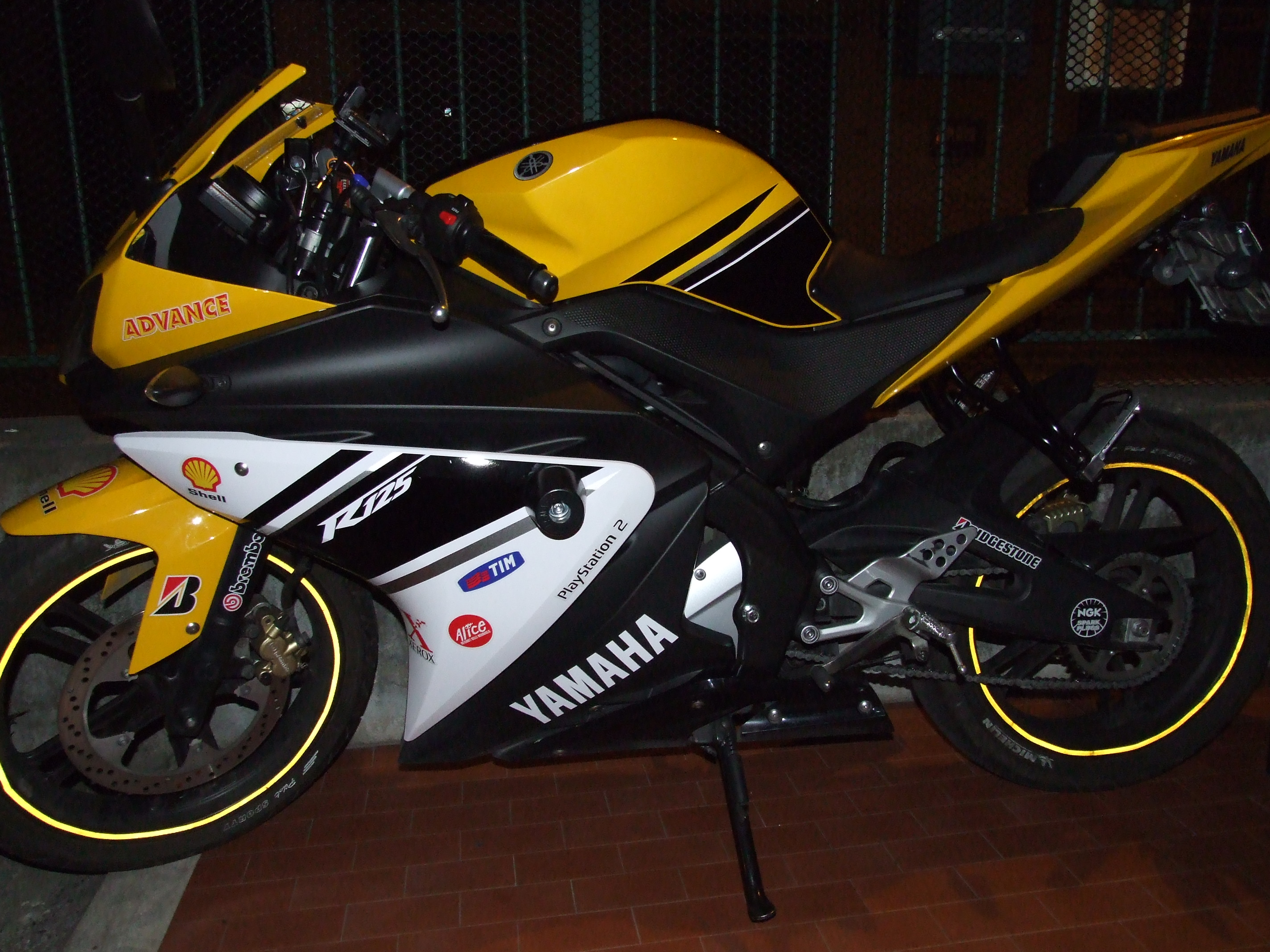 An yellow Yamaha R125